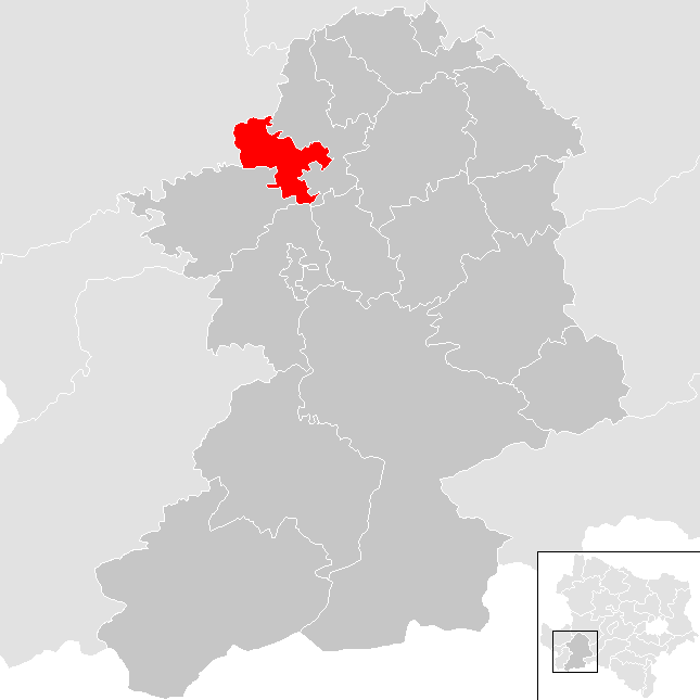 Bezirk Scheibbs